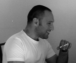 Cezary Zbierzchowski